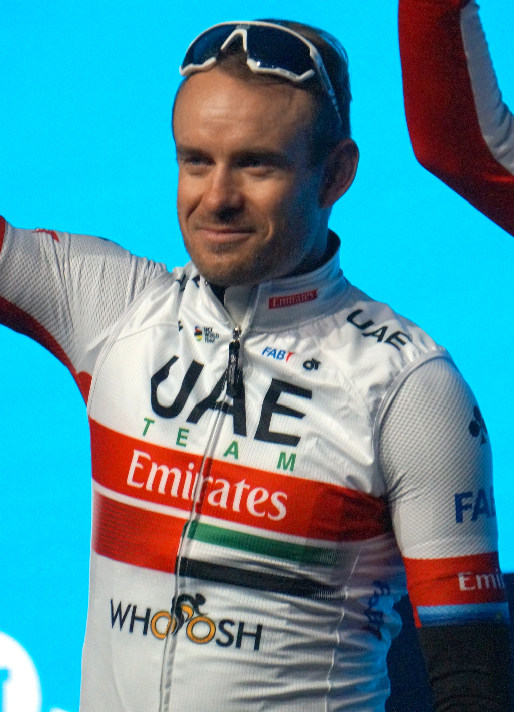 Alexander Kristoff bij de ploegenvoorstelling in Gent voor de Omloop Het Nieuwsblad 2020